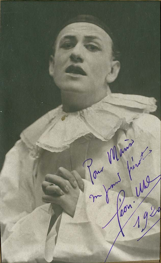 poète Lèon Uhl déguisé en Pierrot